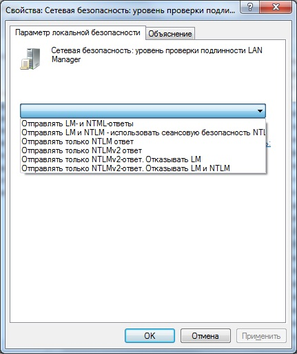 Параметры безопасности